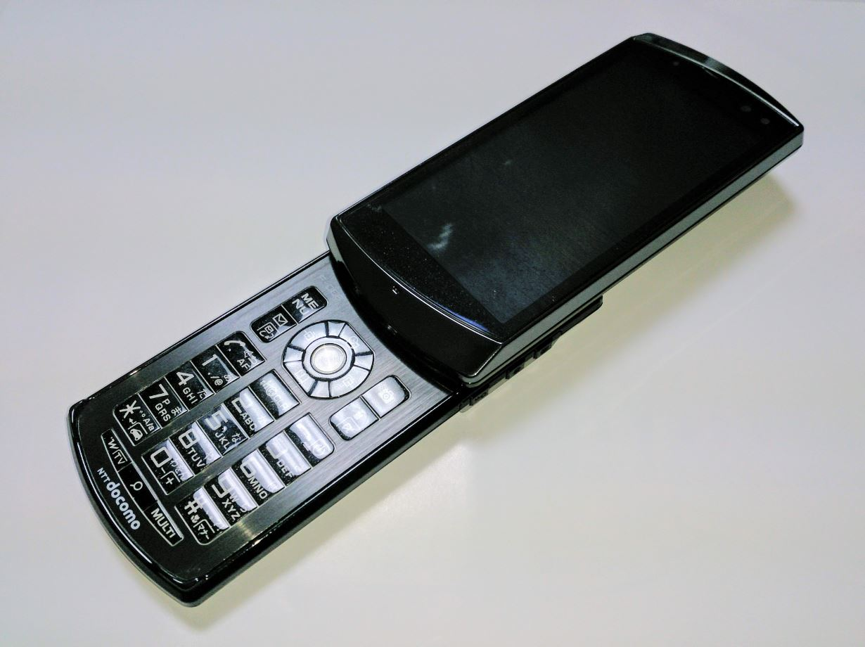 F-06Bのスライド時